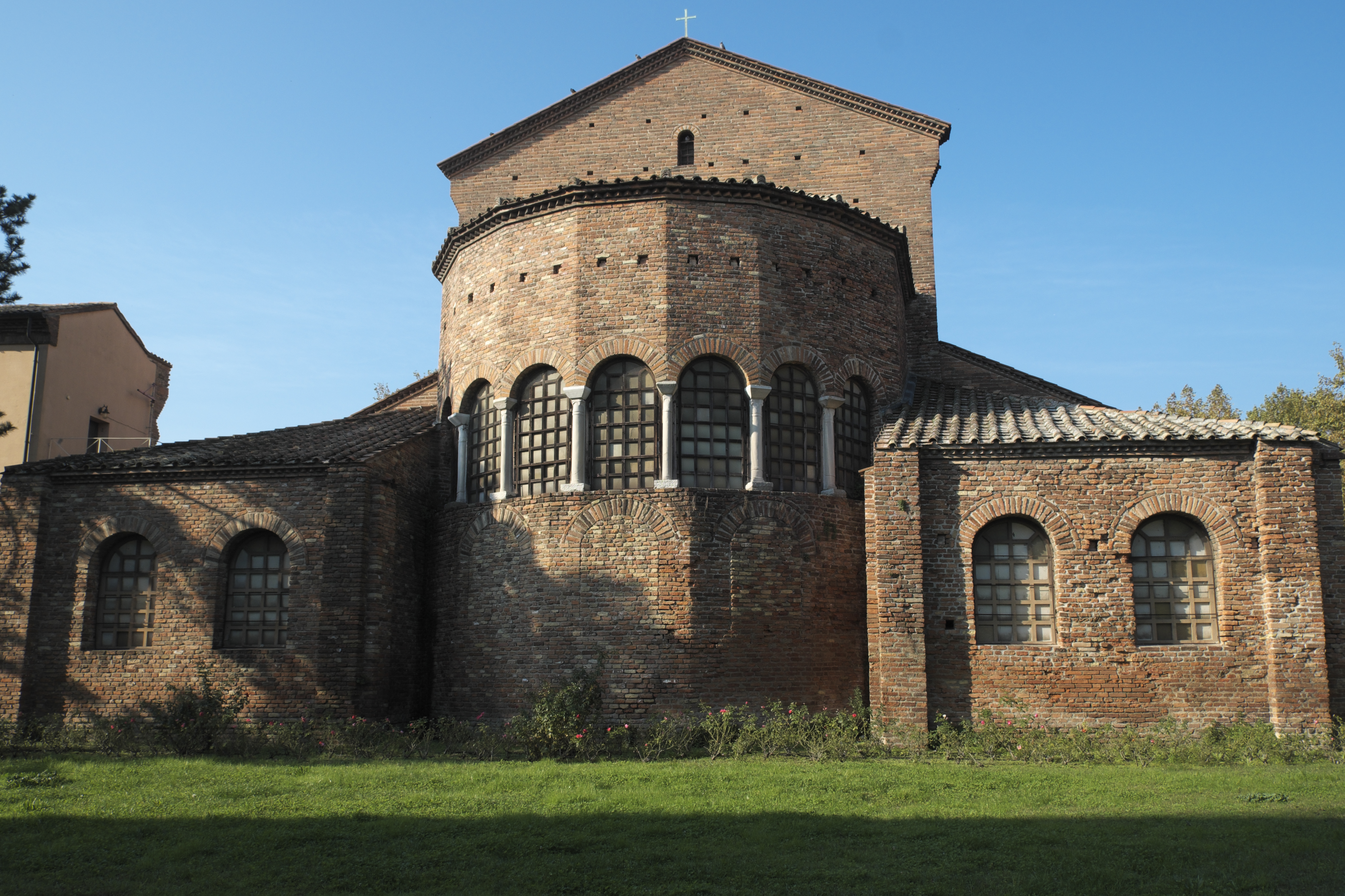 San Giovanni Evangelista in Ravenna (Emilia-Romagna/Italien), Apsis